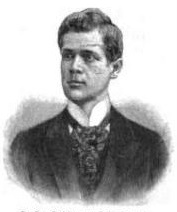 Der deutsche Zoologe Otto zur Strassen (1869-1961).